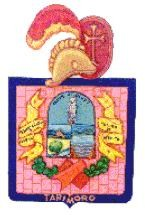 Stemma Tarimoro Guanajato